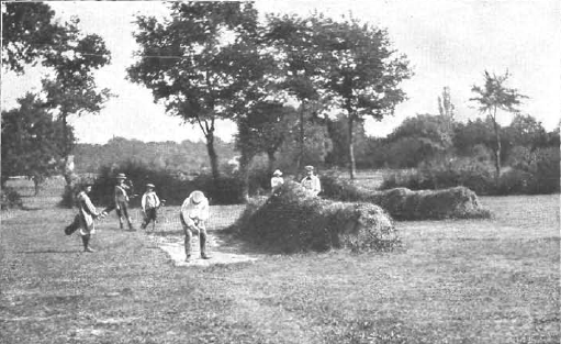 Cop Bunkers on a 9 Hole Golf Course in Geneva, Switzerland